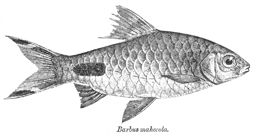 Barbus mahecola = Puntius mahecola (Valenciennes, 1844)